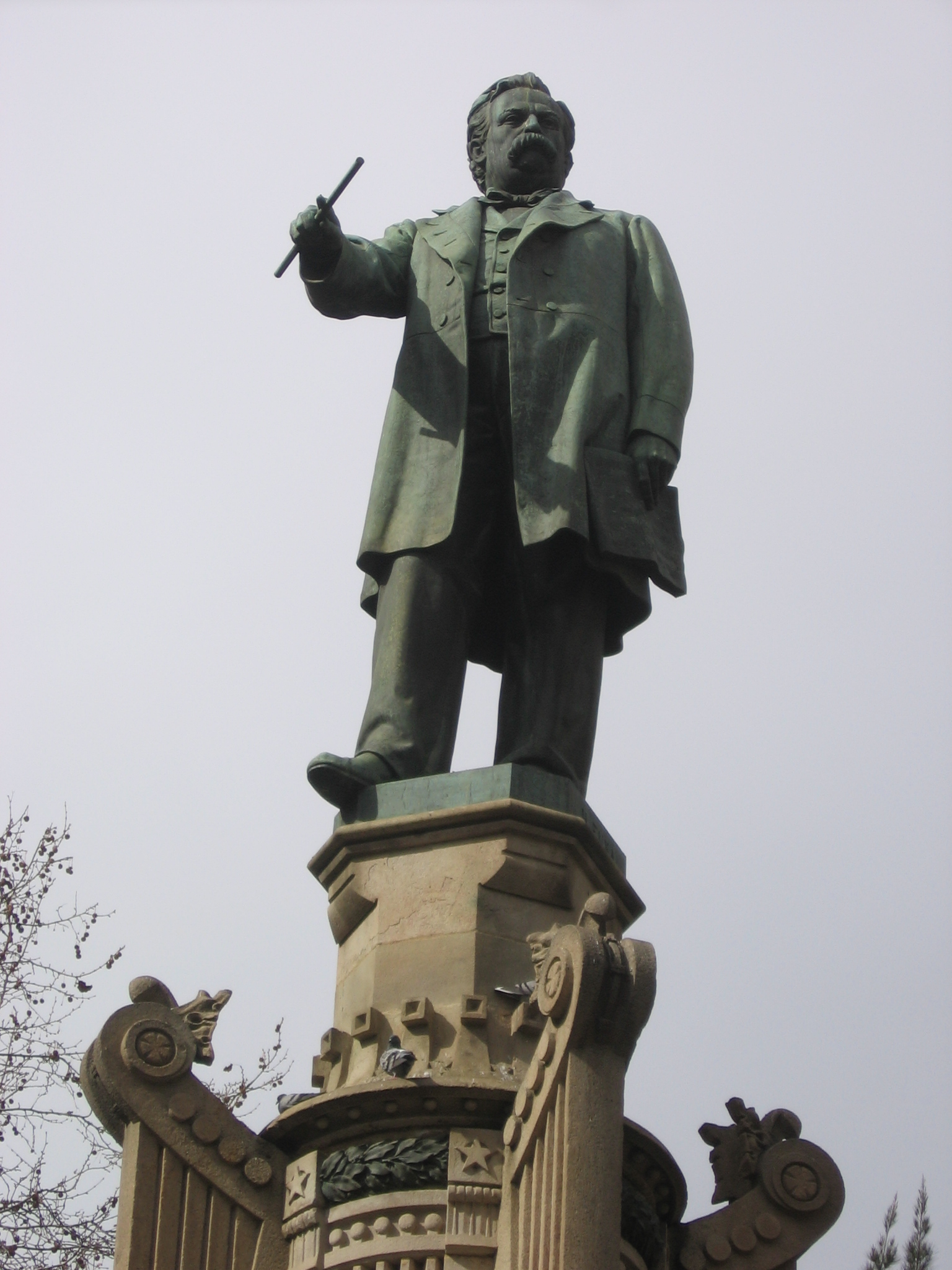 Monumento a Josep Anselm Clavé, Barcelona.